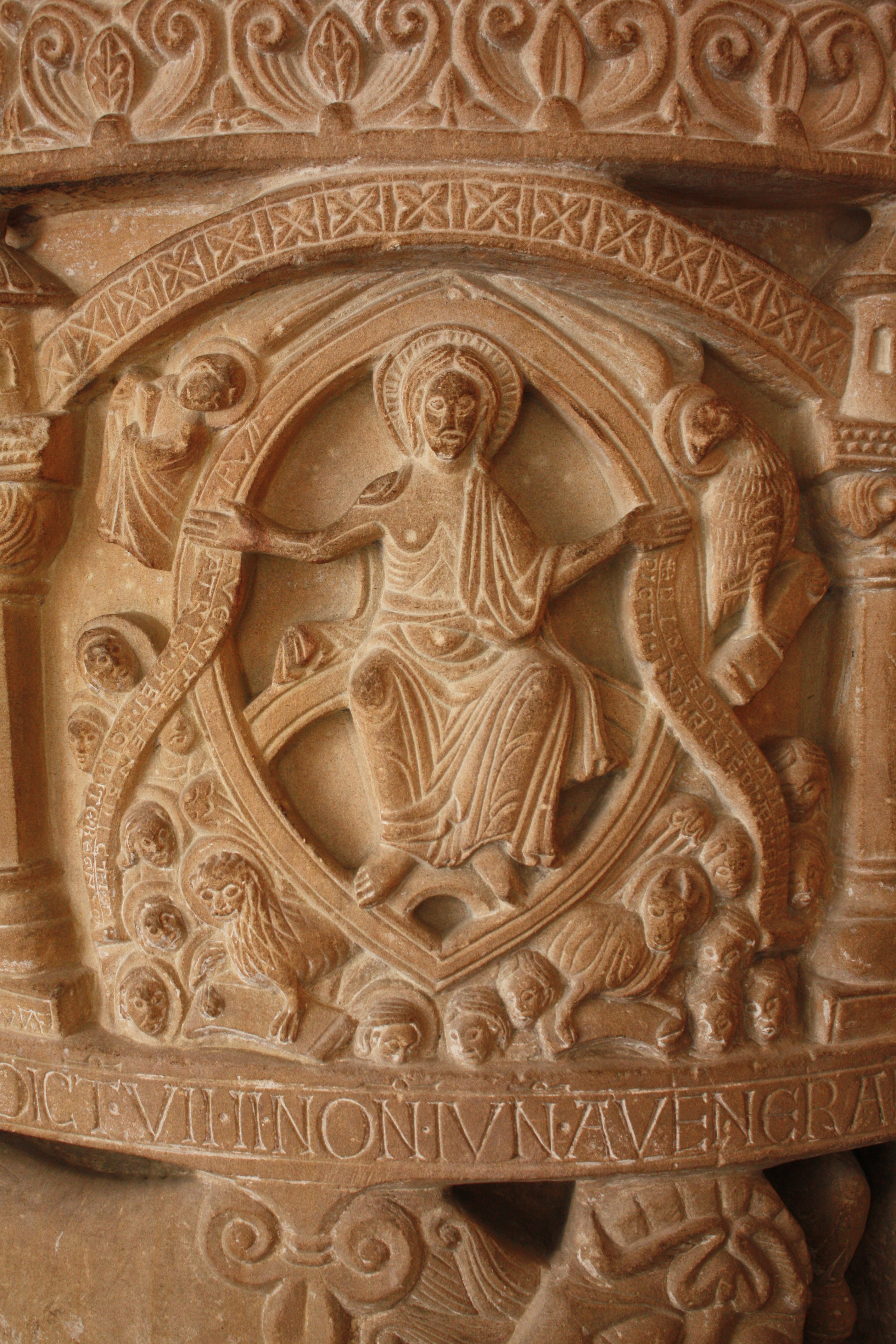 Detail des Taufsteins in St. Bonifatius Freckenhorst